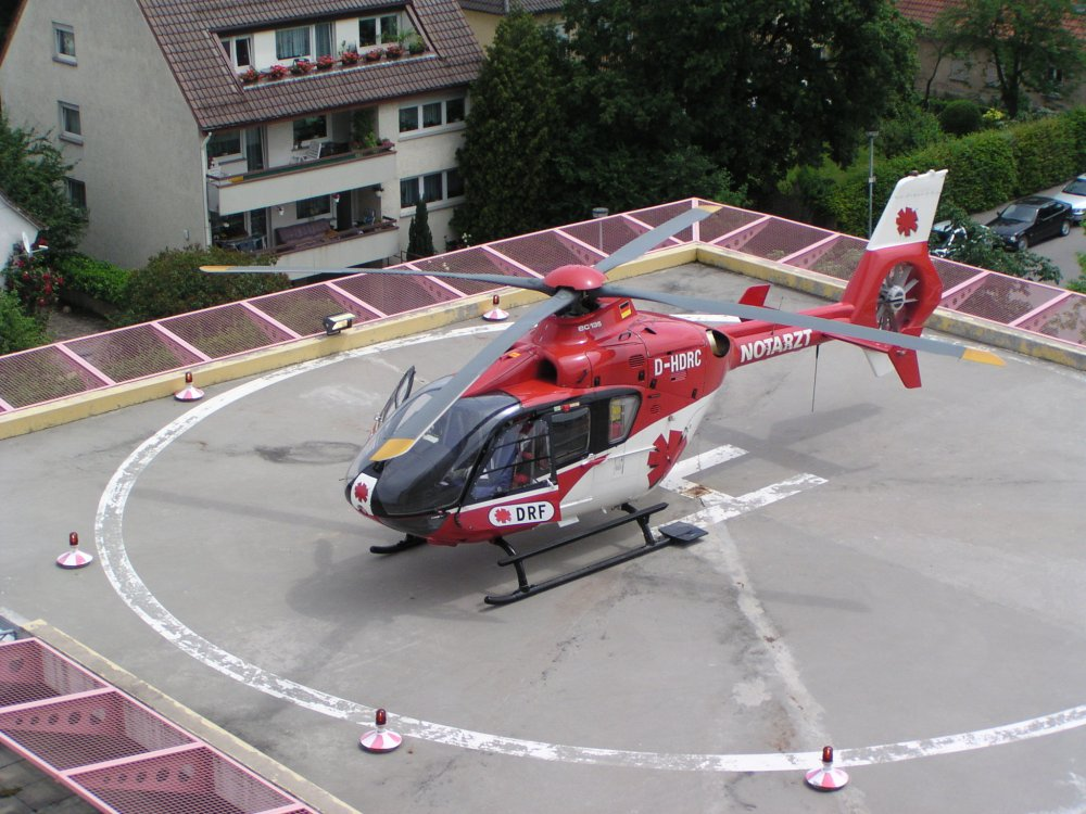 Helipad auf Krankenhausdach